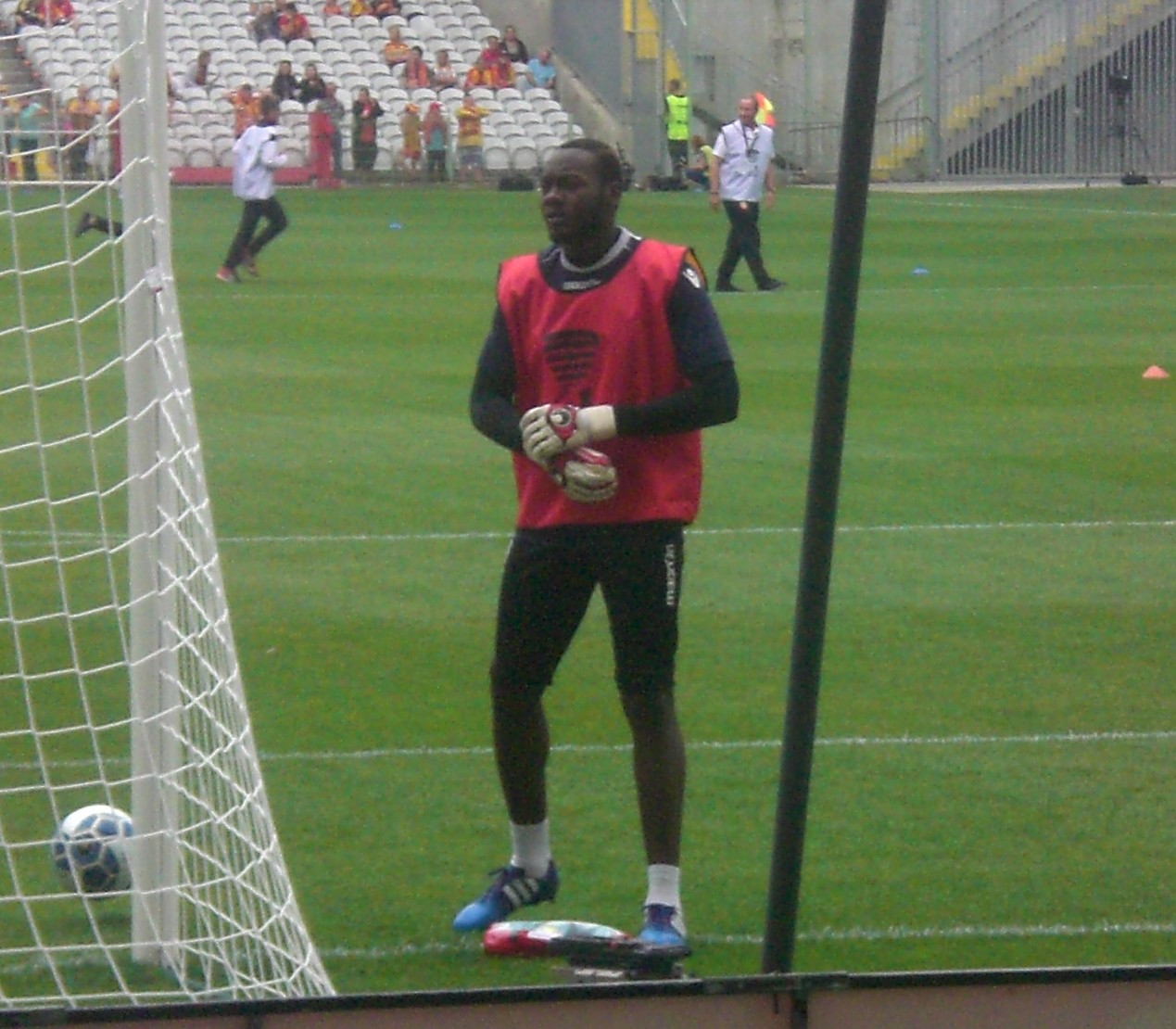 Riffi Mandanda avant le match Lens / AC Ajaccio, le 11 août 2015, au Stade Bollaert-Delelis, comptant pour le premier tour de la Coupe de la Ligue française de football.